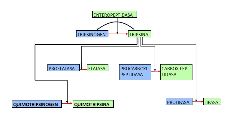 Activació de zimogens a partir de la forma activa de la tripsina a conseqüència de la enteropeptidasa. En blau els zimogens i en verd els enzims actius.